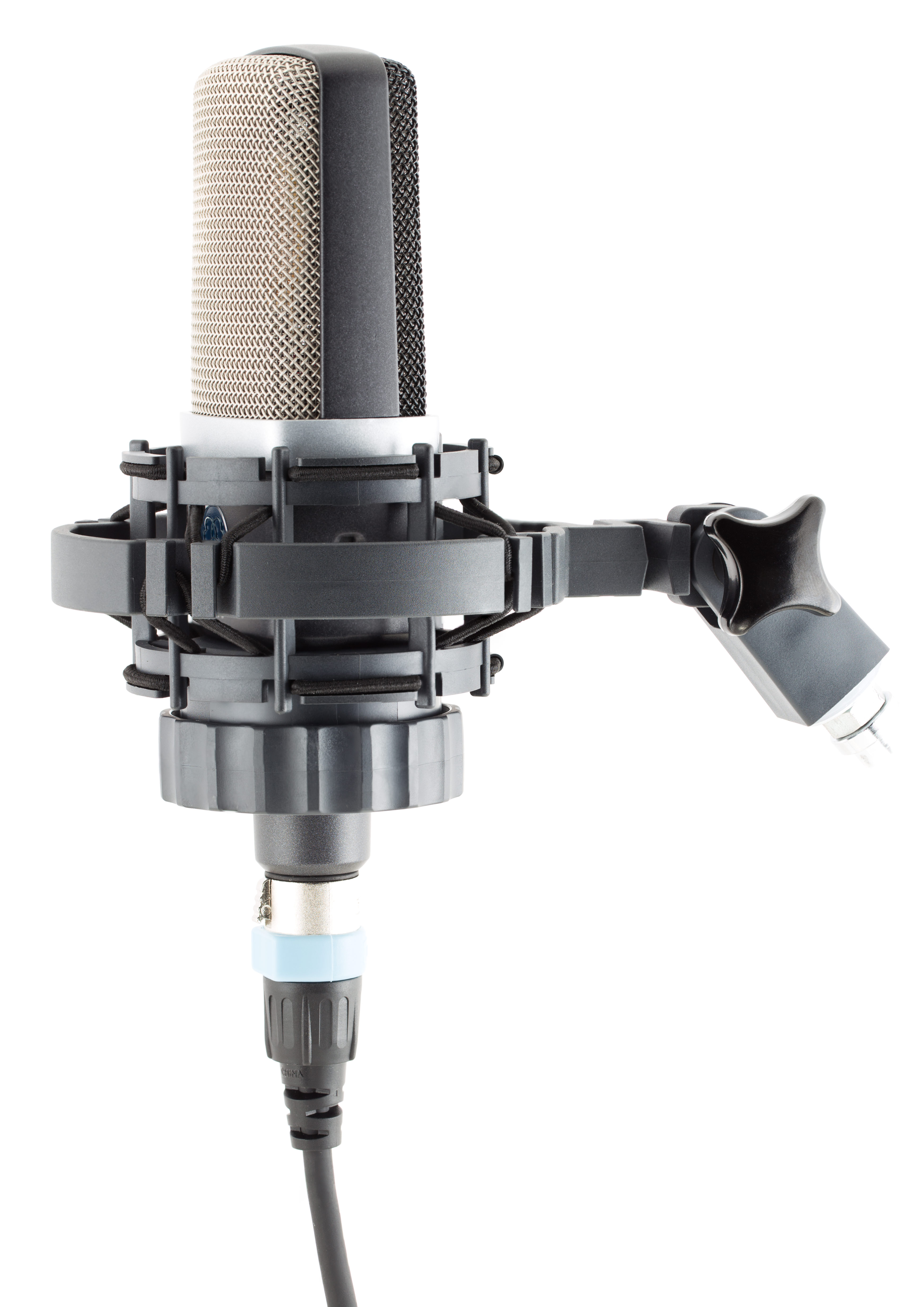 AKG C214 Kondensator-Mikrofon in die H85 Spinne eingespannt